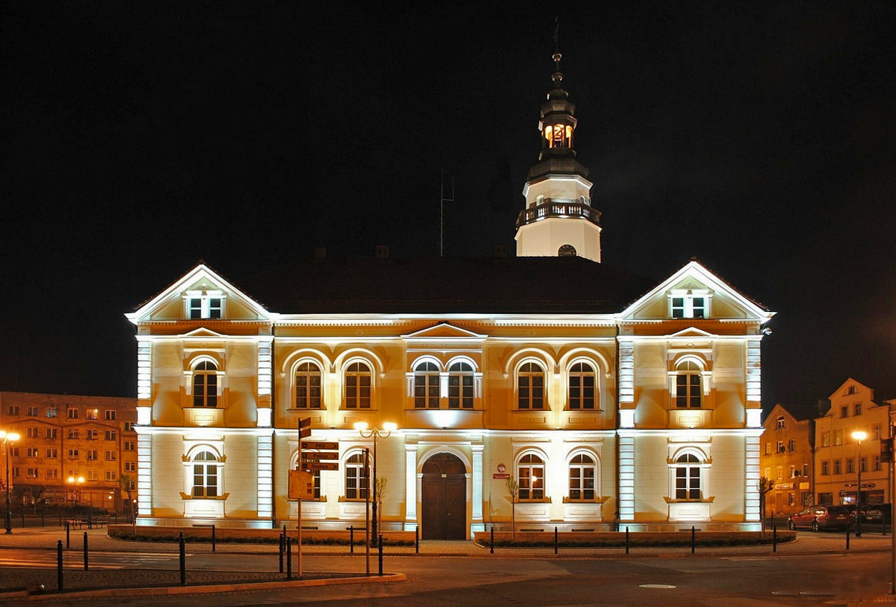 Mirsk, pl. Wolności 39 - ratusz, XVIII